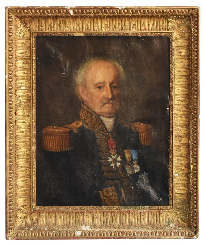 Huile sur toile époque XIXème.